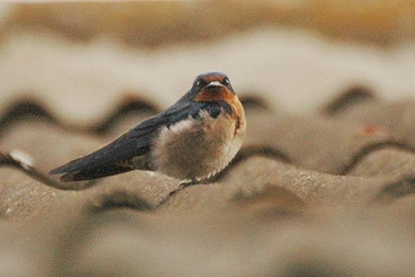 Uganda Angola Swallow (Hirundo angolensis) Mbweya QE NP Dec 2005